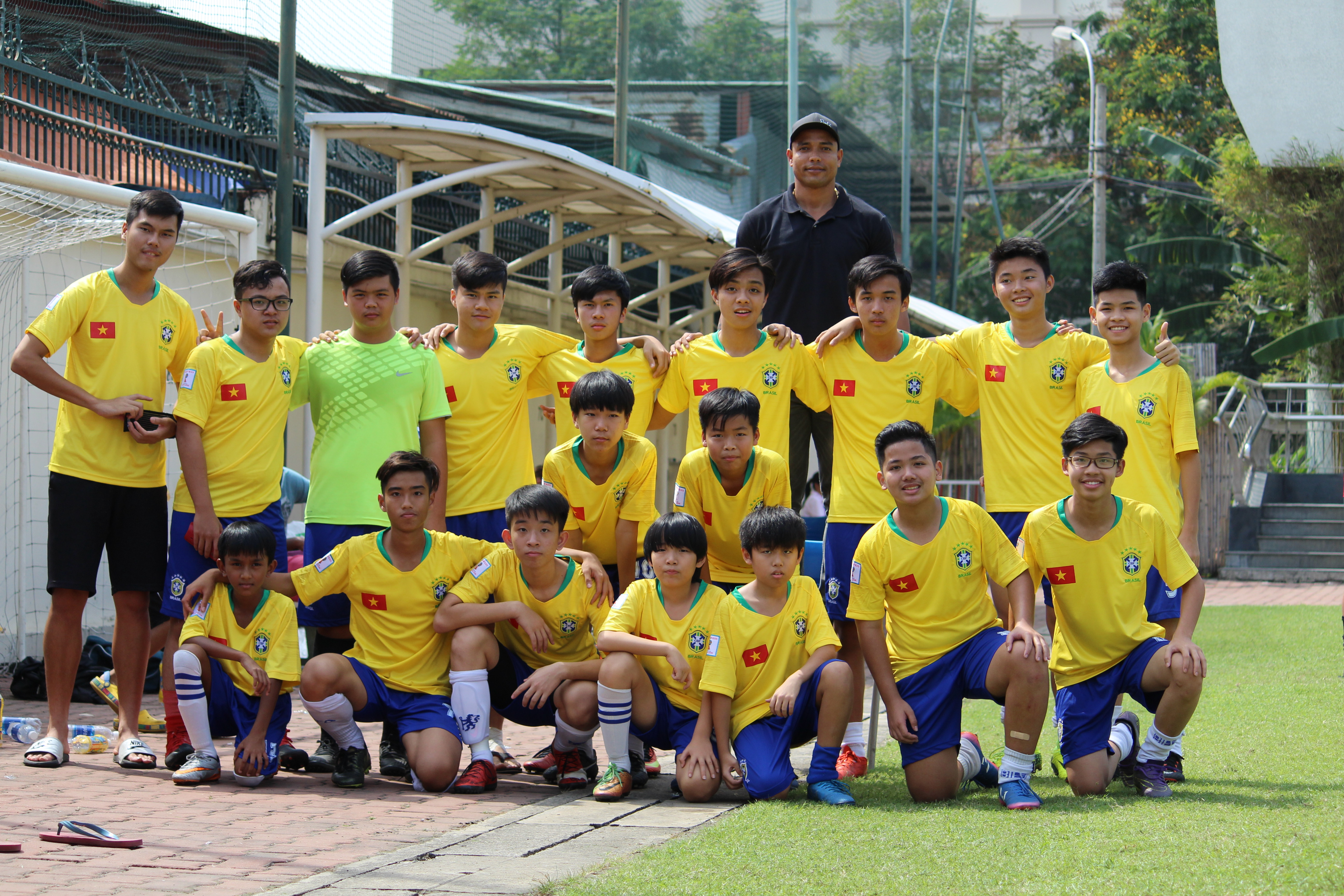 Ricardinho e seus alunos em sua escola, a BIFA- Brazilian International Football Academy.